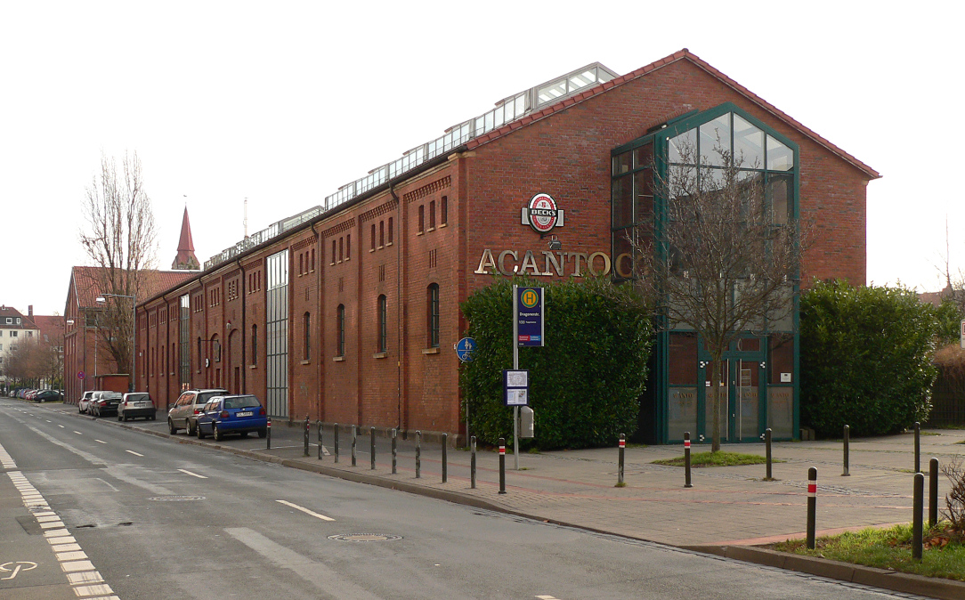 Backsteingebäude des Militärreitinstituts